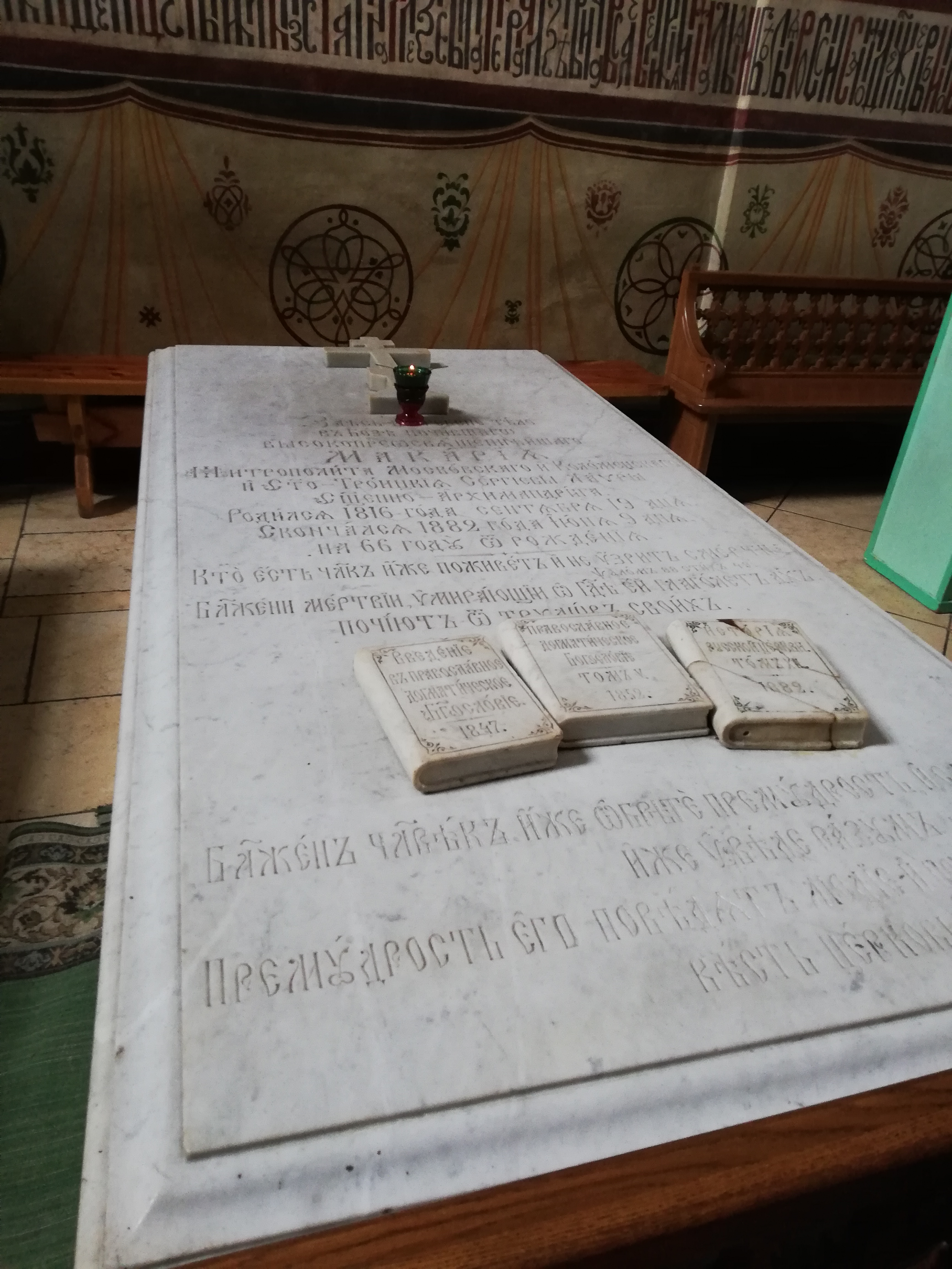 Tomba di Macario I (Bulgakov), Vescovo metropolita di Mosca, nel Monastero di Sergiev Posad